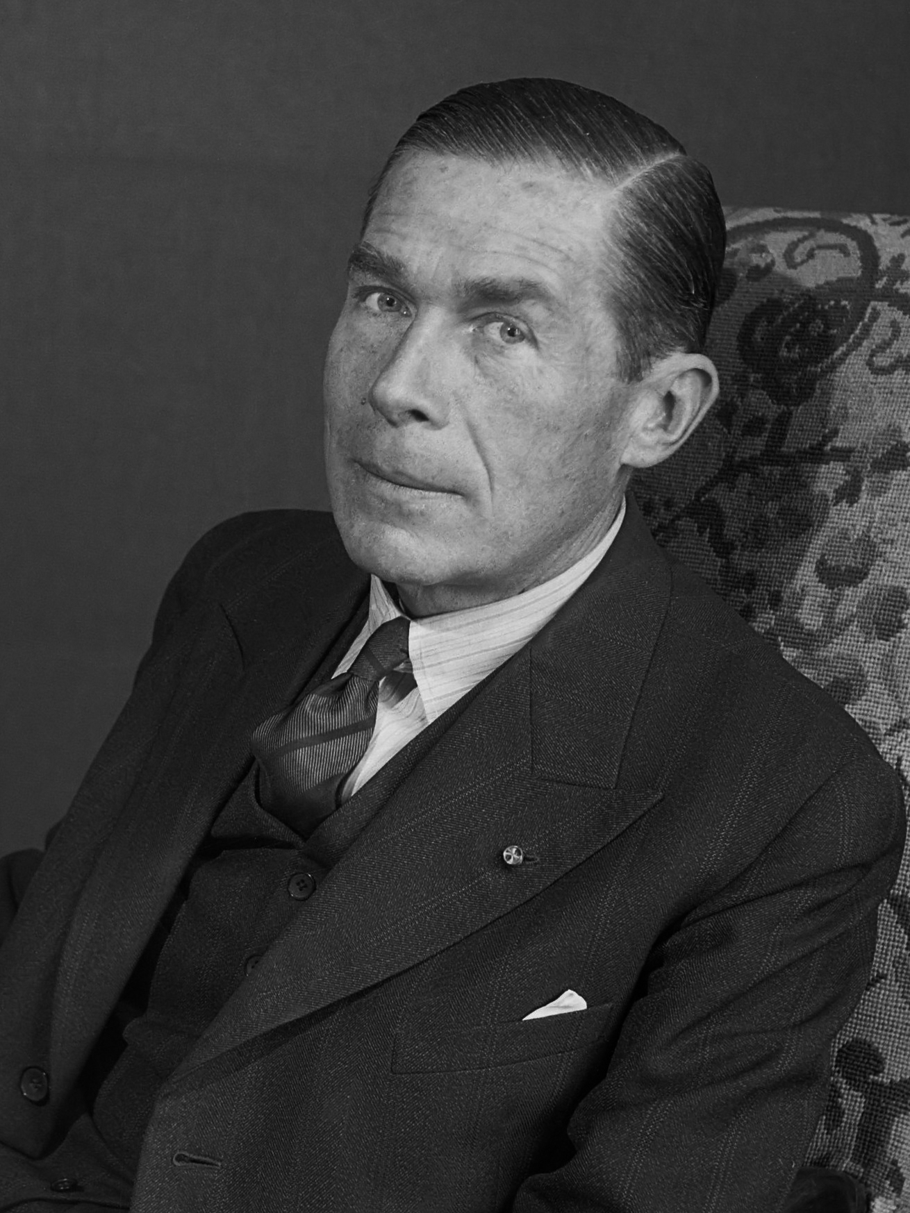 Directeur jhr. Roell van Rijksmuseum 1945